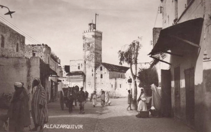 Alcazarquivir, ville du Protectorat espagnol dans le nord du Maroc, années 1920/1930.